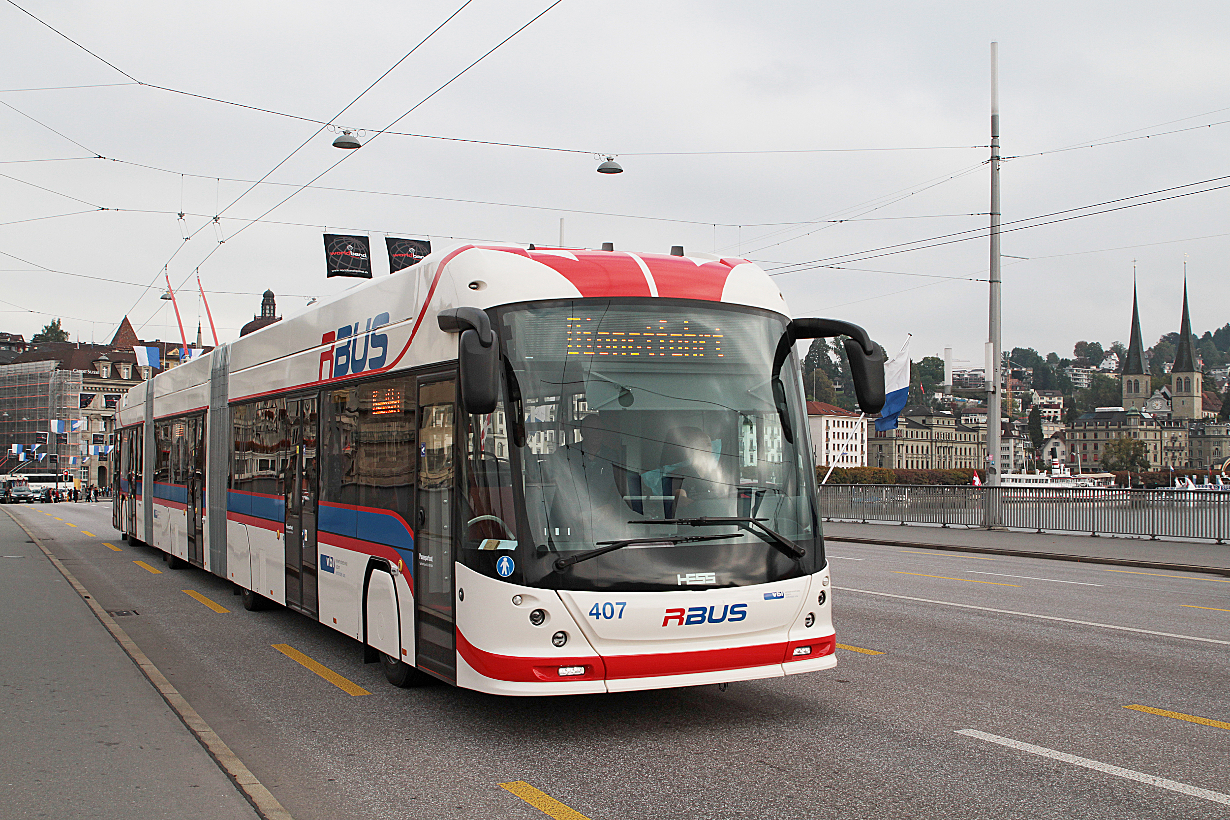 Der frisch ausgelieferte Hess/Vossloh-Kiepe BGGT-N2D Nr. 407 der Verkehrsbetriebe Luzern auf einer Dienstfahrt auf der Seebrücke